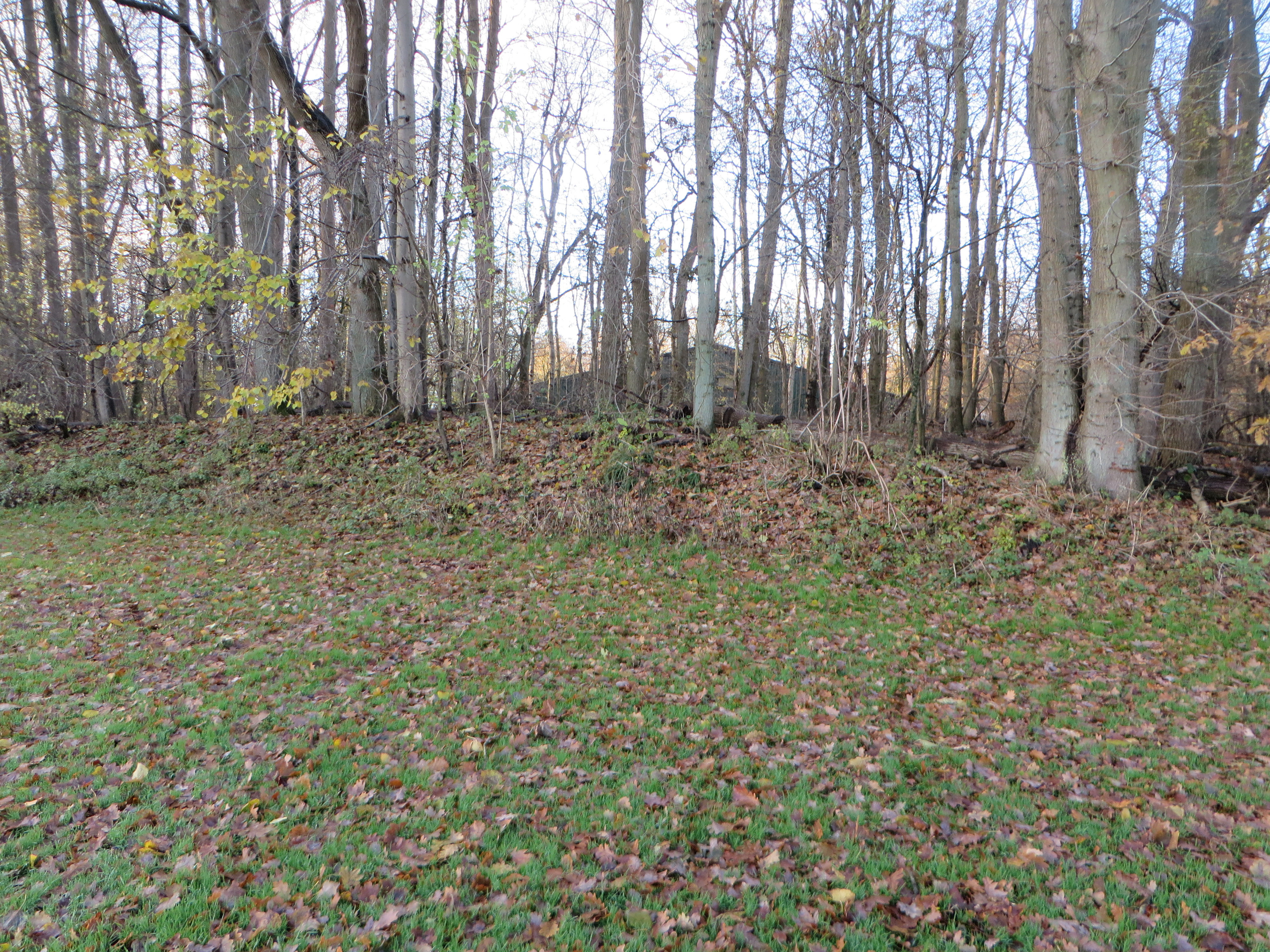 Ehrenhain (Flensburg-Mürwik-Fruerlund 2017), Bild 21